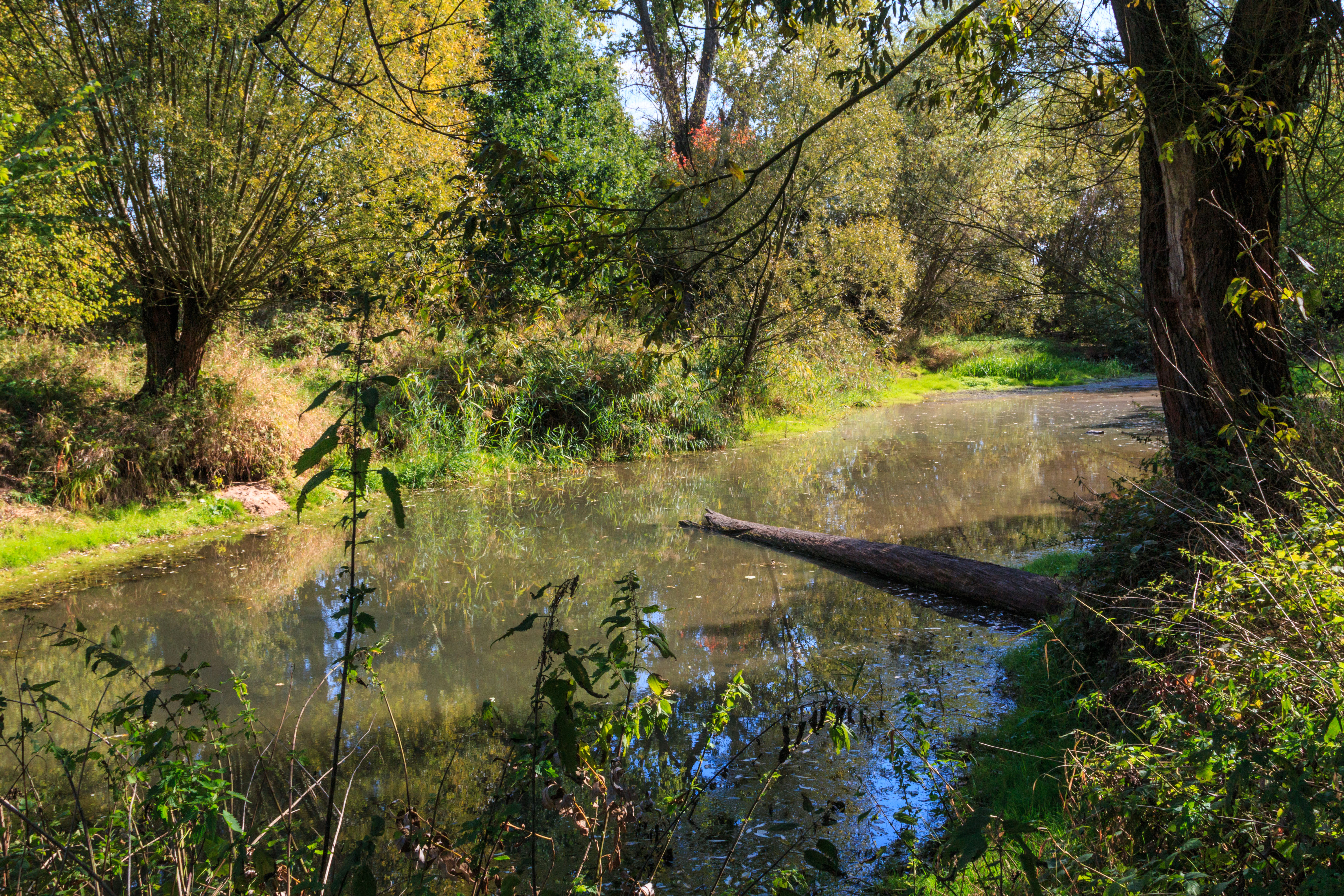 Zemanství - mrtvé rameno Labe u Labětína Project: Vodstvo.